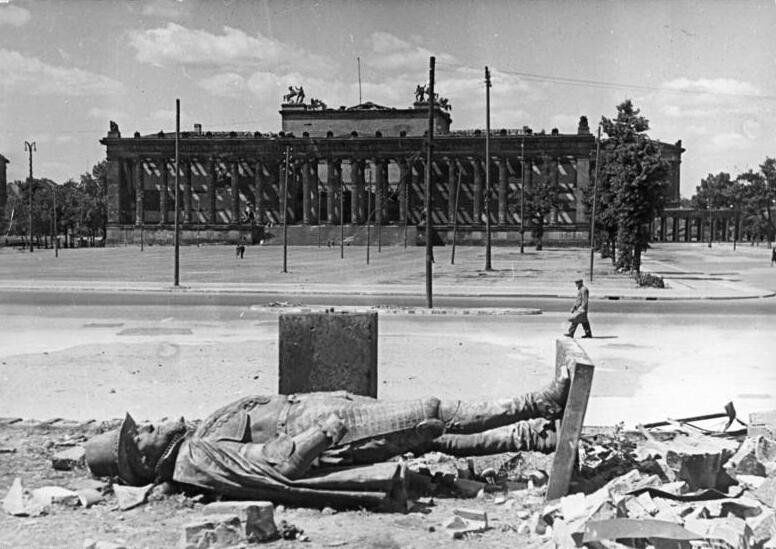 Berlin, Altes Museum, Gestürztes Denkmal ADN-ZB Donath Berlin 1950: Blick auf das Alte Museum (im Vordergrund ein beschädigtes Denkmal vom Berliner Schloß) .